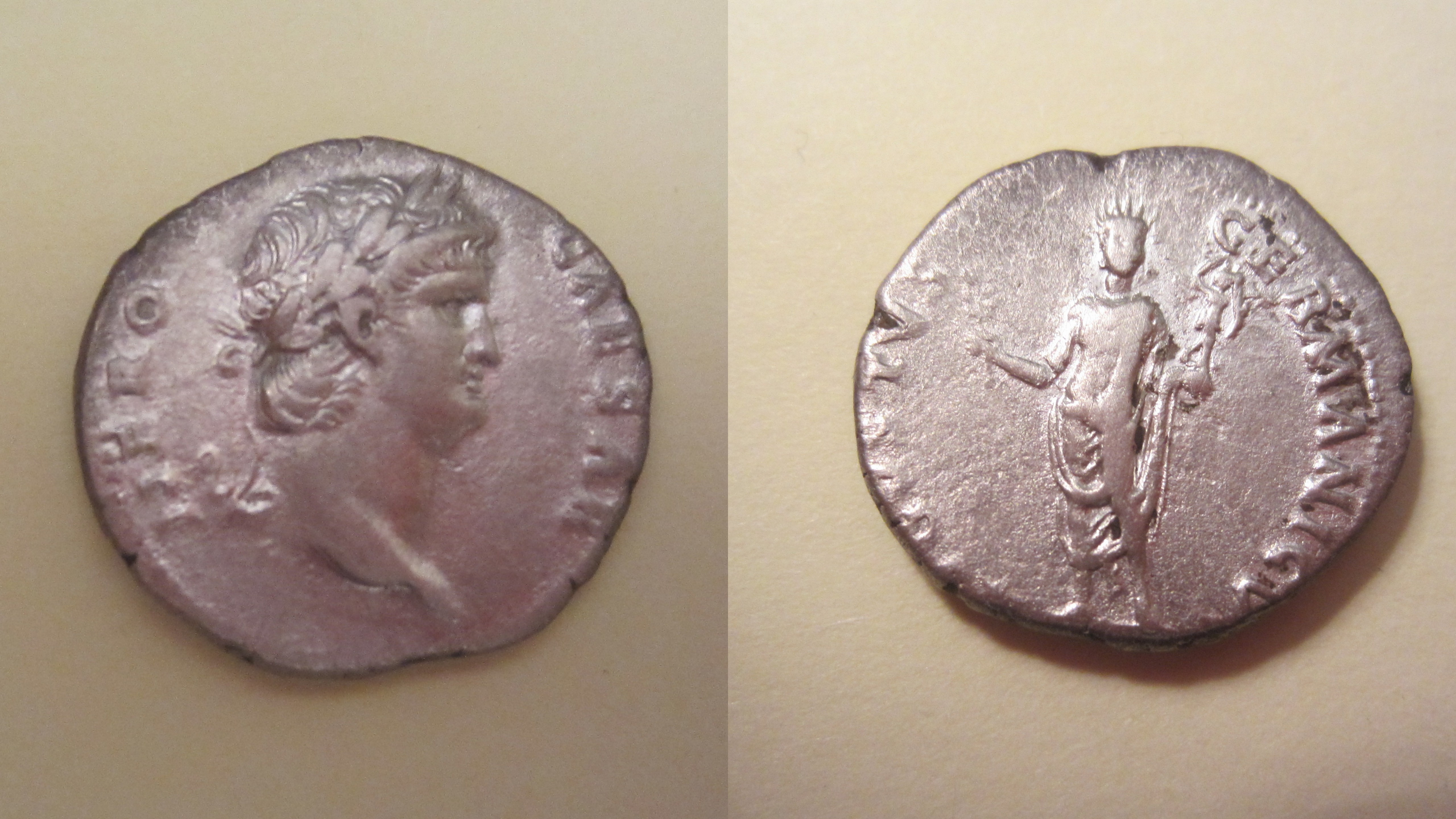 Le revers représente Néron radié tenant à la main le globe nicéphore, représentant le monde. Il s'agit vraisemblablement de la représentation du colosse de bronze de Néron, la seule qui demeure actuellement.